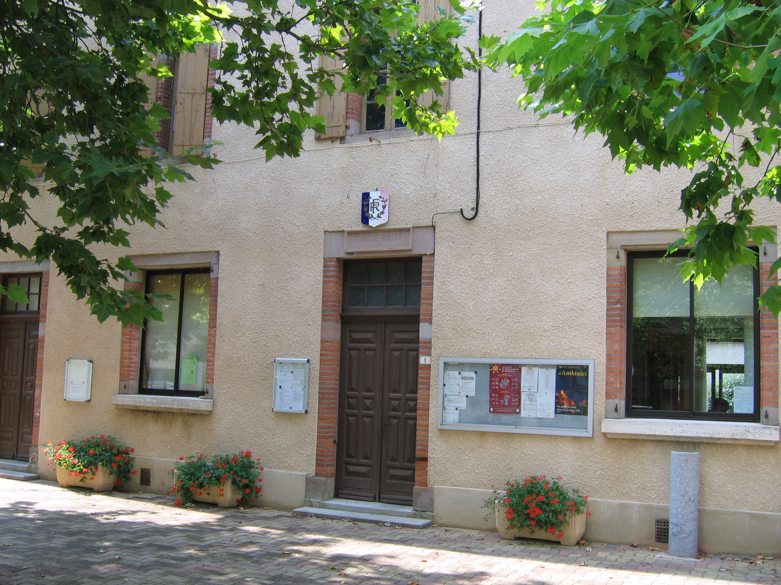 Mairie de Teillet